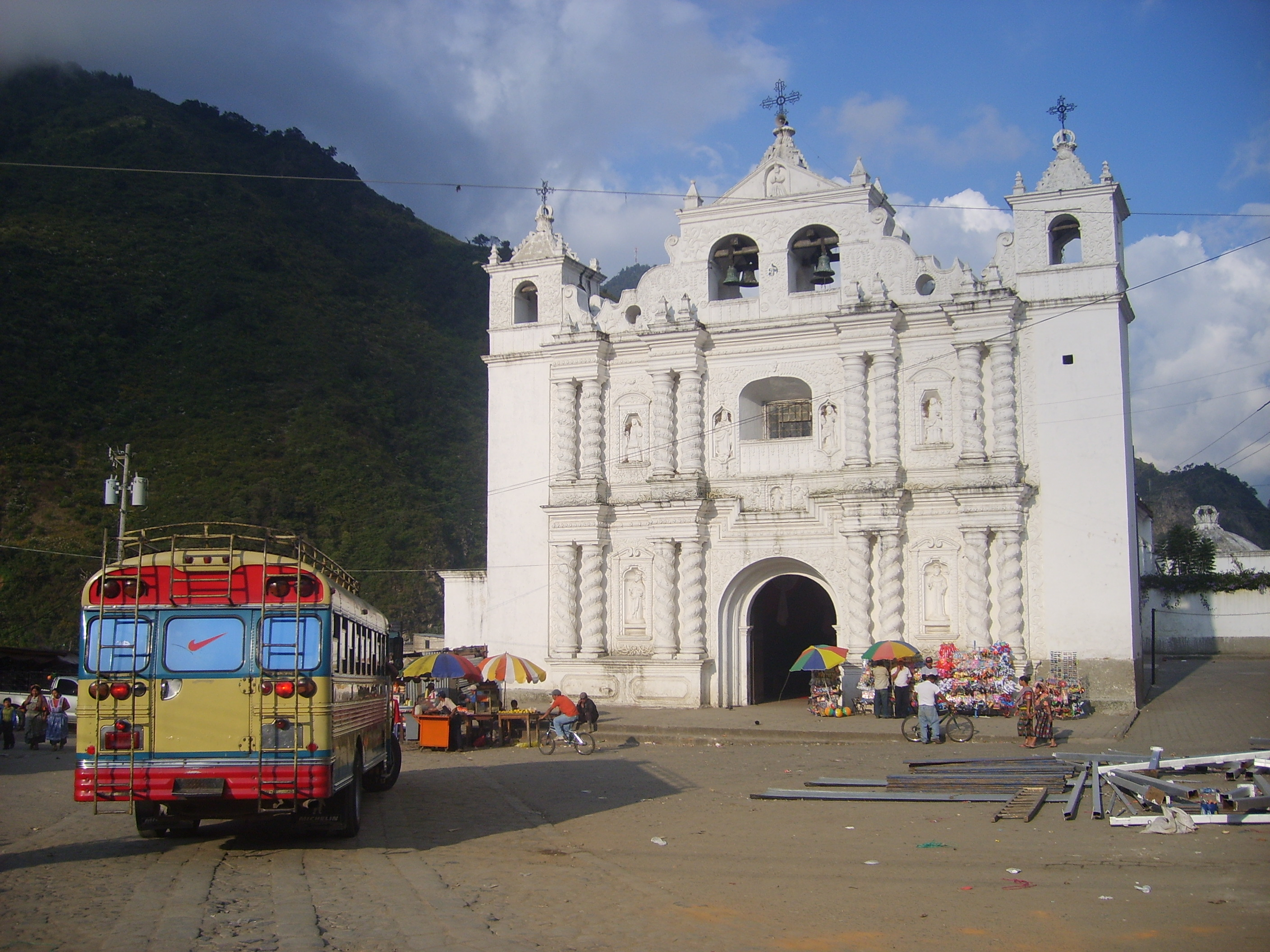 Church in Zunil, Quetzaltenango department, Guatemala